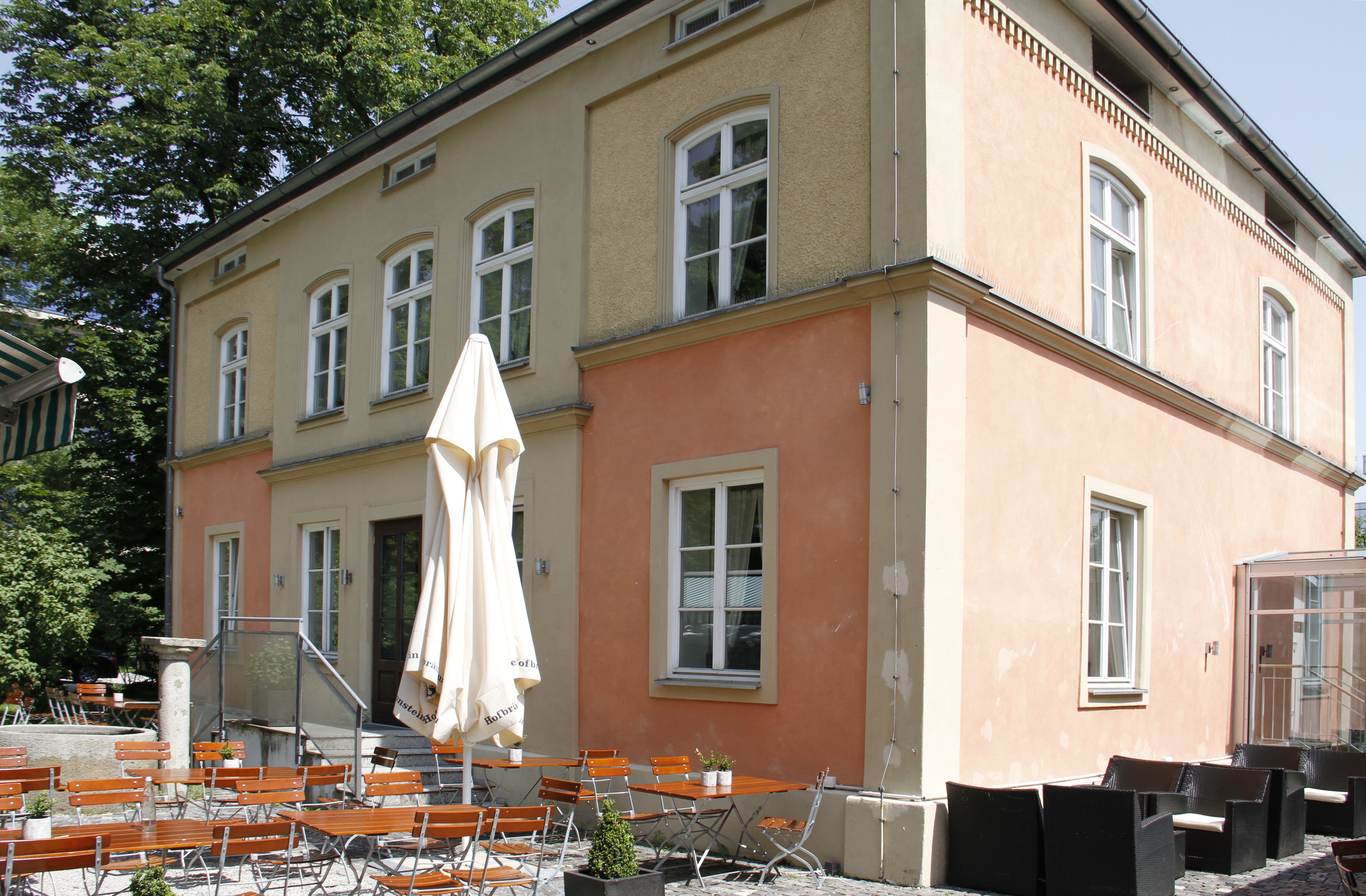 Villa Flora, Hansastraße 44, München, Sendling-Westpark